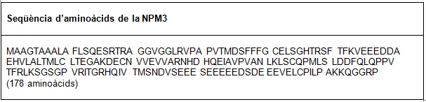 NPM3 seq